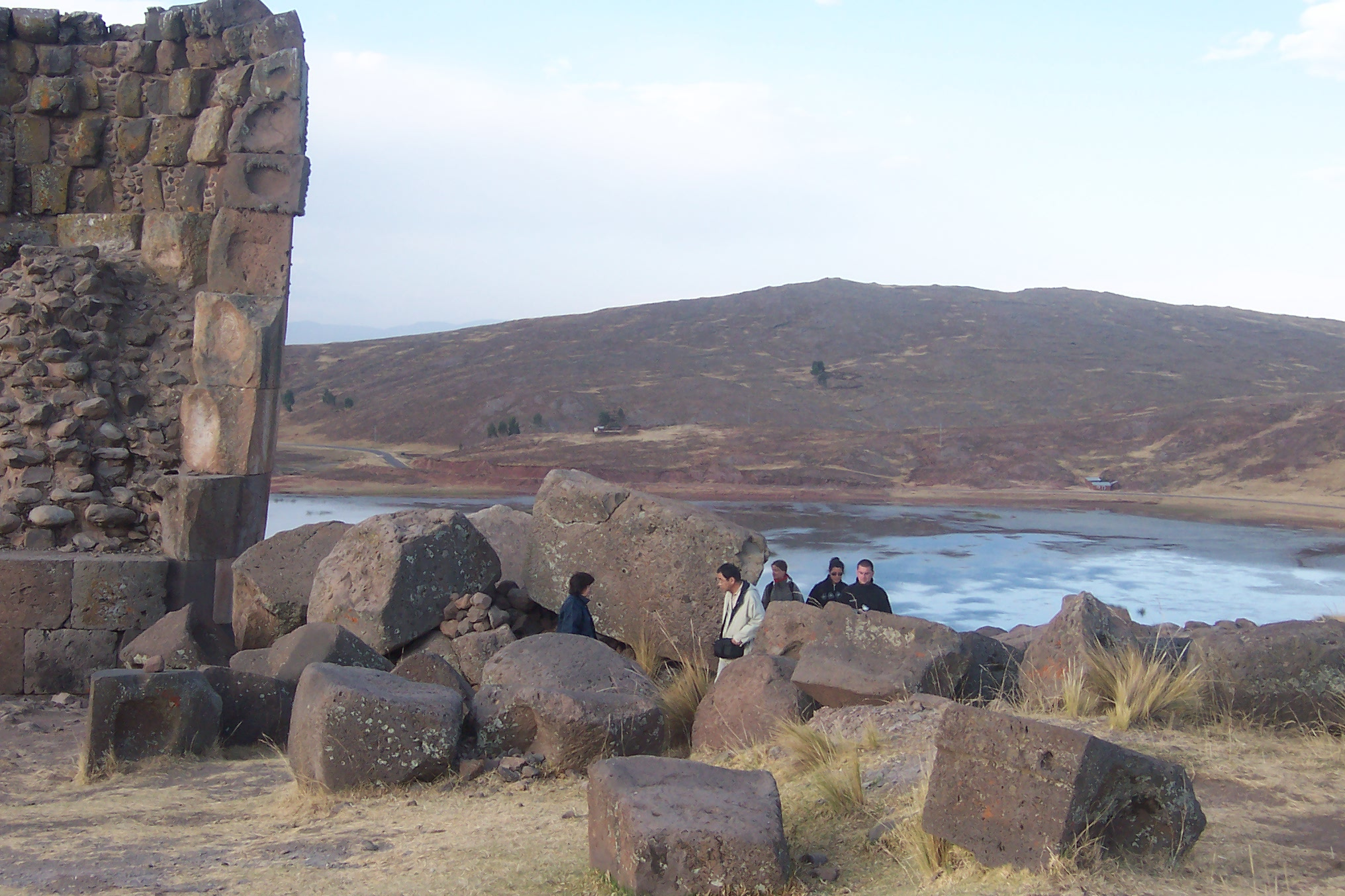 Chulpa de la época Inca en cosntrucción. Autor: Alfredobi Fecha: Agosto 2006